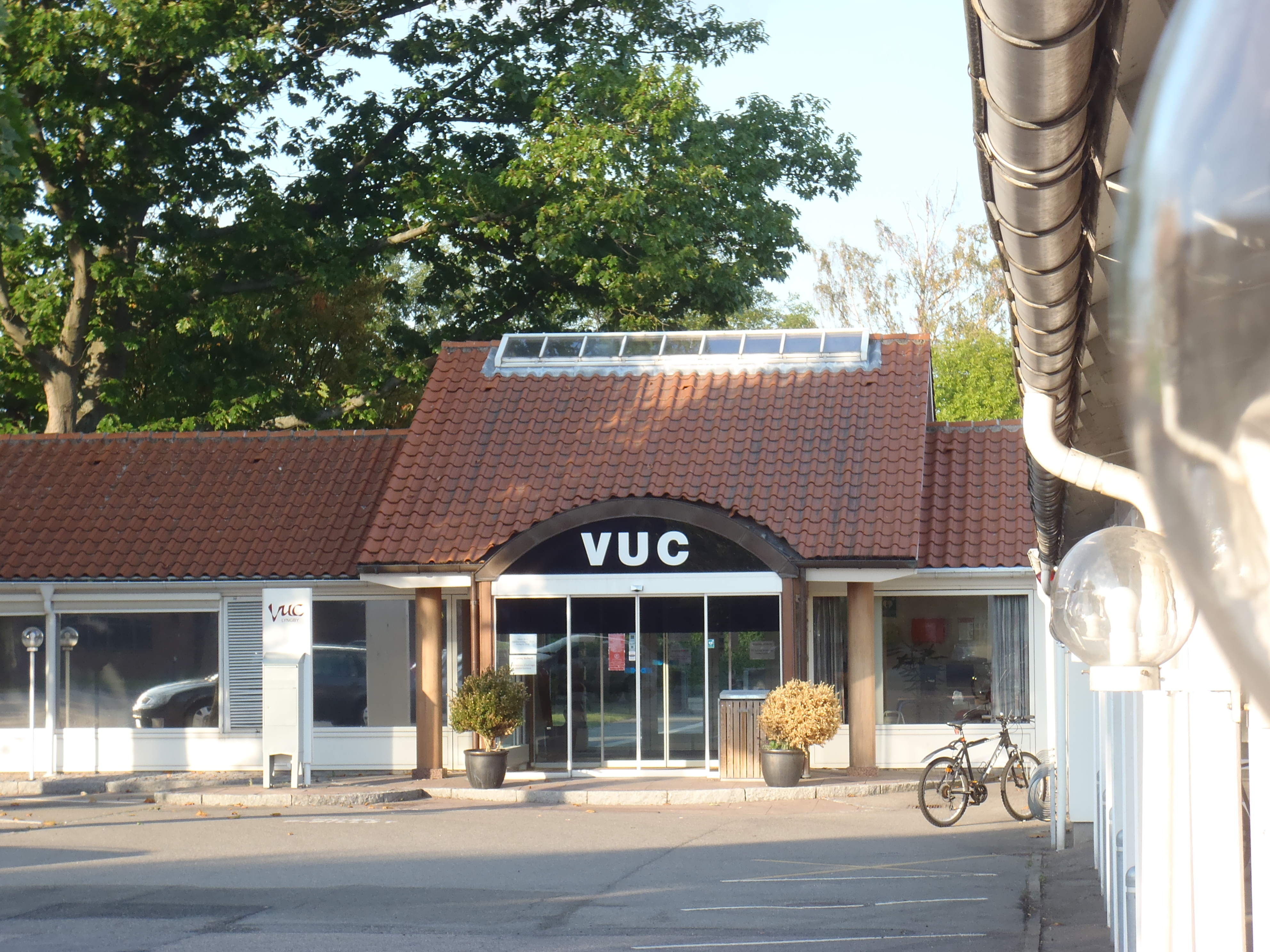 VUC Lyngby. Uddannelsesinstitution i Kongens Lyngby